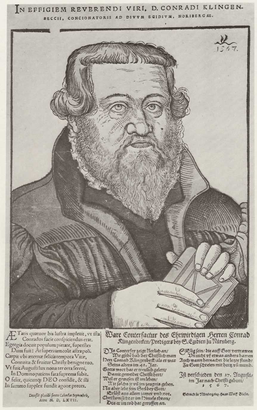 Portrait des Nürnberger Predigers Conrad Klingenbeck ((1526-1567)